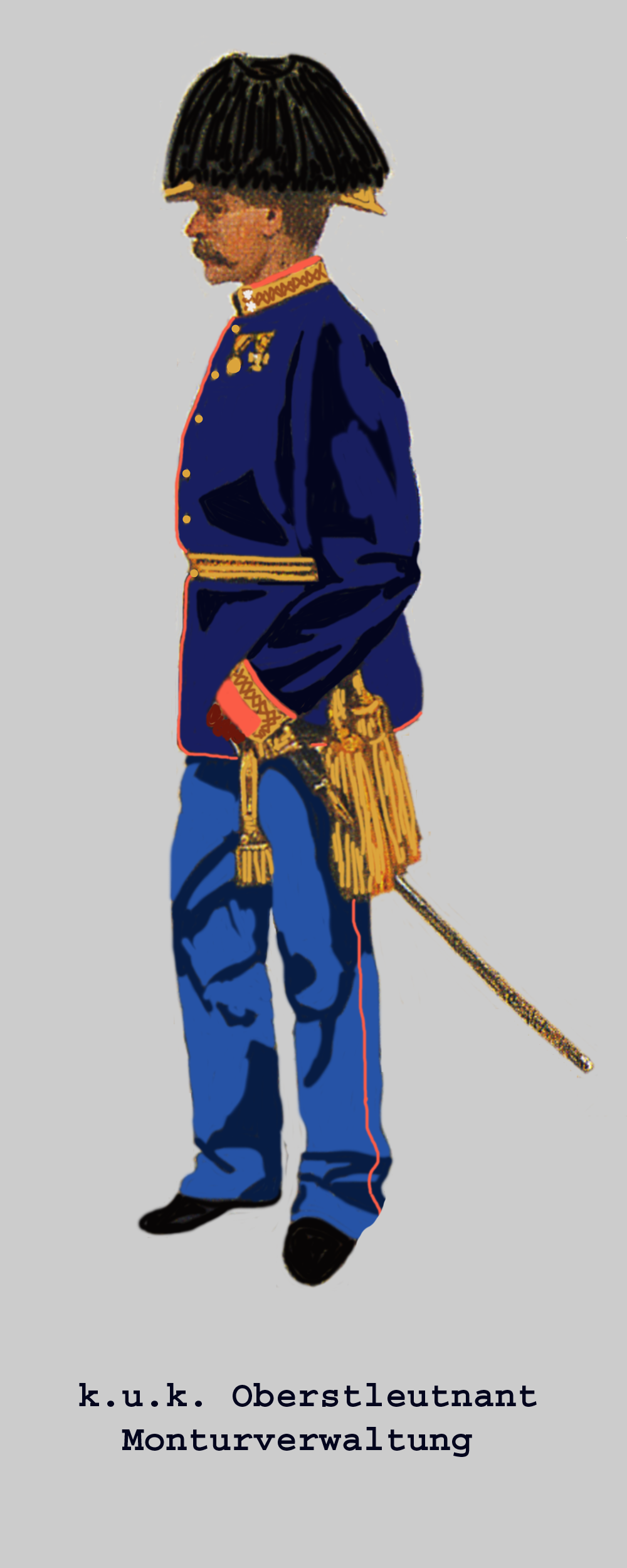 Oberstleutnant der k.u.k. Monturverwaltung in Parade (Egalisierung Gold/Krapprot) - Nach einem Gemälde im Heeresgeschichtlichen Museum in Wien. Adjustierung von 1895